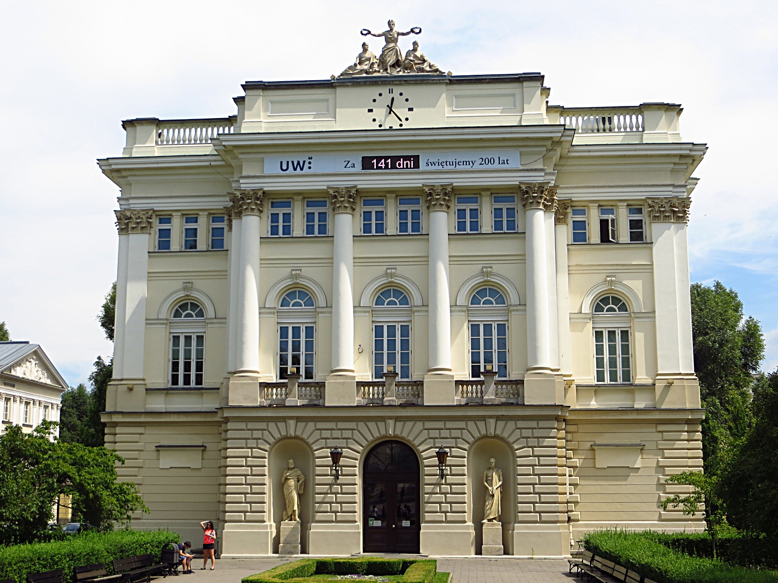 Uniwersytet Warszawski